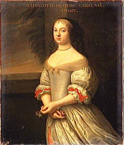 Charlotte de Hesse-Cassel, Electrice de Bavière, épouse en 1650 de Charles-Louis, duc de Bavière (1627-1686)- représentée l'année de son mariage